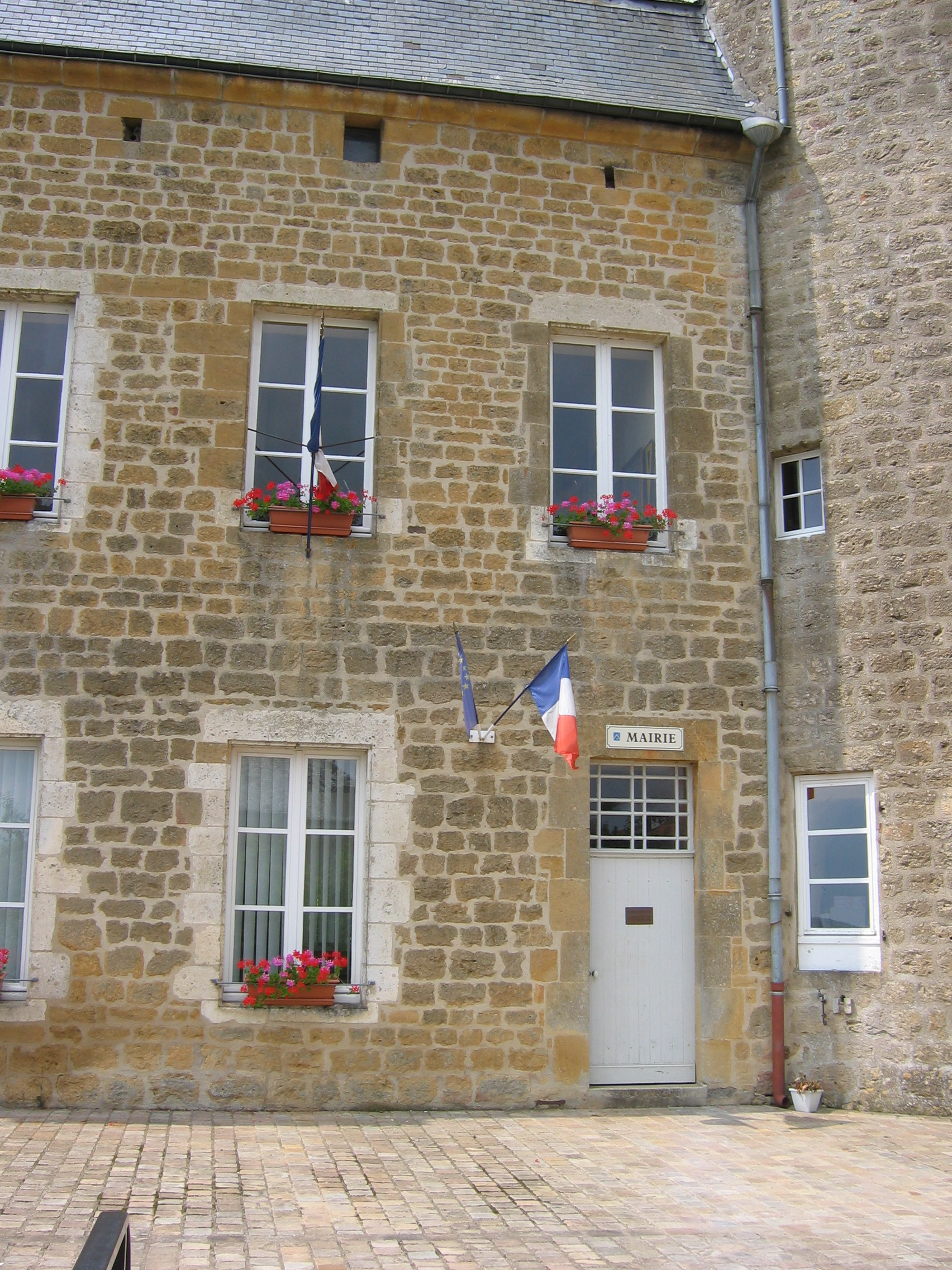 La mairie de la commune de l'Echelle, située dans le château. En Ardennes (France). .